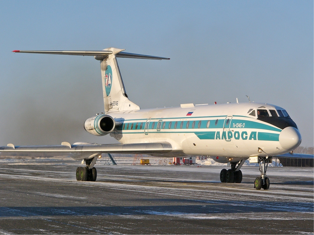 Alrosa-Avia Tupolev Tu-134B-3